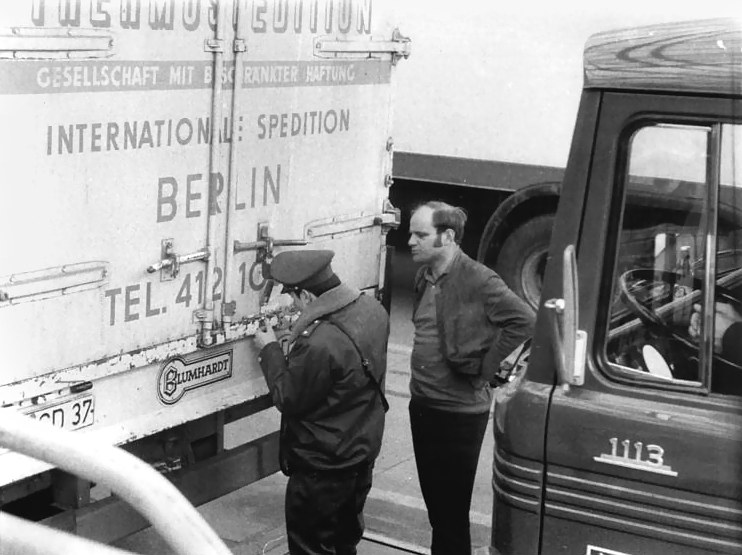 ADN-ZB Reiche-31.3.72- Berlin: Zeitweilige Regelung in Kraft getreten- Seit 29.3.72 werden entsprechend der gemeisamen Festlegung des Politbüros des ZK der SED und des Ministerrates der DDR als Geste des guten Willens der DDR zeitweilige Regelungen gehandhabt, die nach Inkrafttreten des Abkommens zwischen der Regierung derDDR und der Regierung der BRD über den Transitverkehr von zivilen Personen und Gütern zwischen der BRD und Berlin (West) wirksam werden. UBz. Verplombung von Lastkraftwagen an der Grenzübergangsstelle Drewitz bei Potsdam.